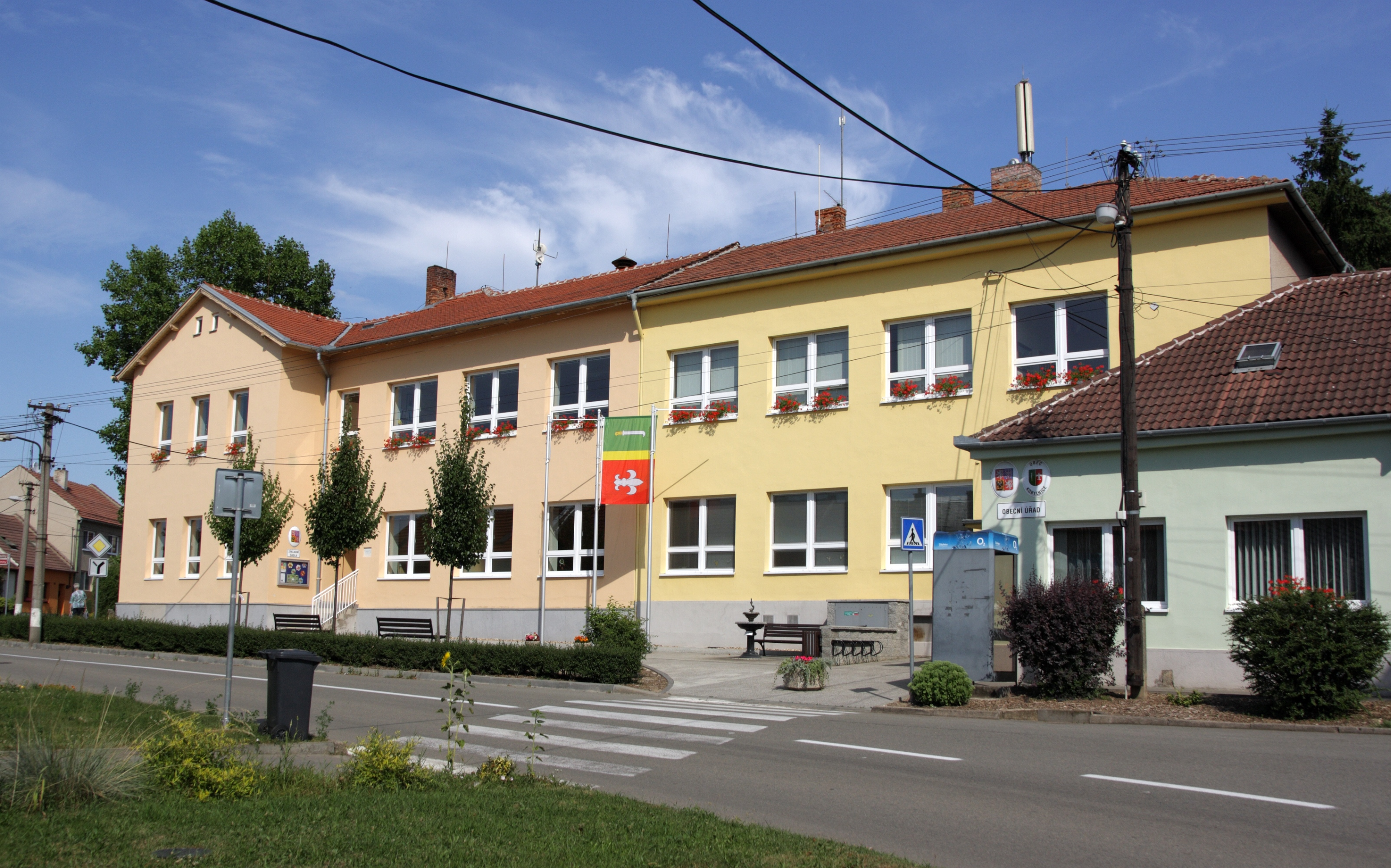 Kobylnice - obecní úřad.